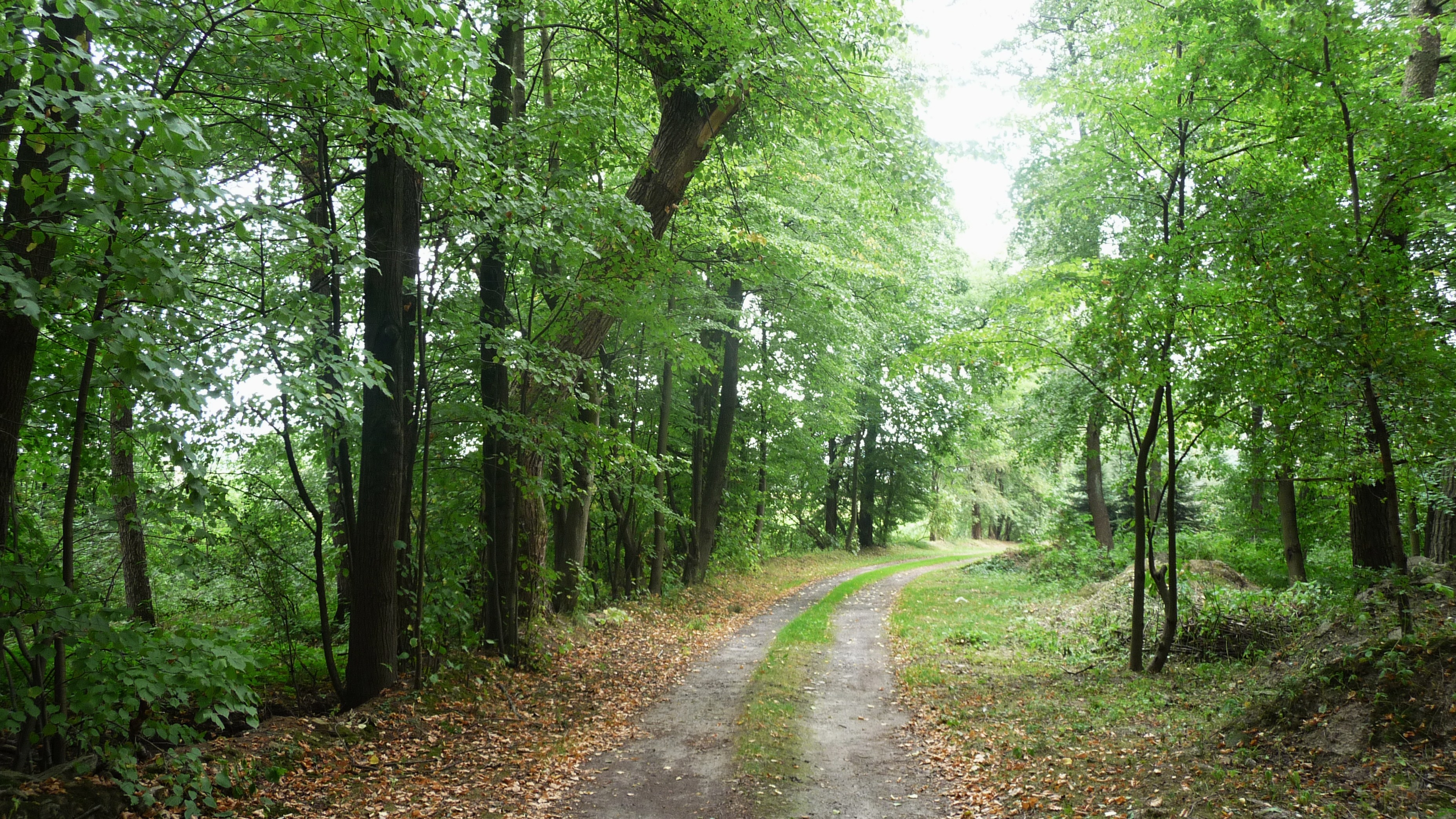 Droga w Starym Lesie